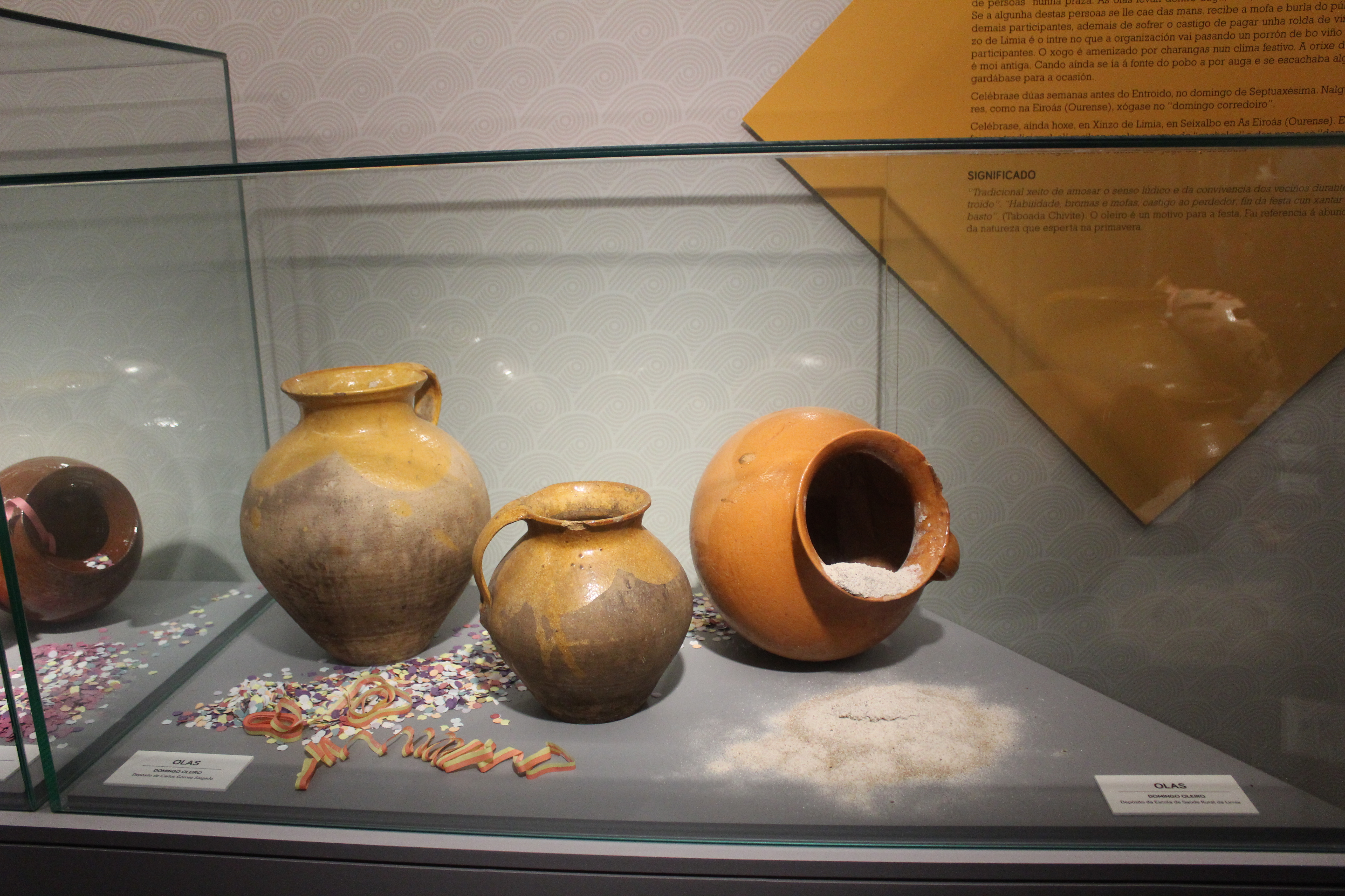 Olas que se utilizan no domingo oleiro